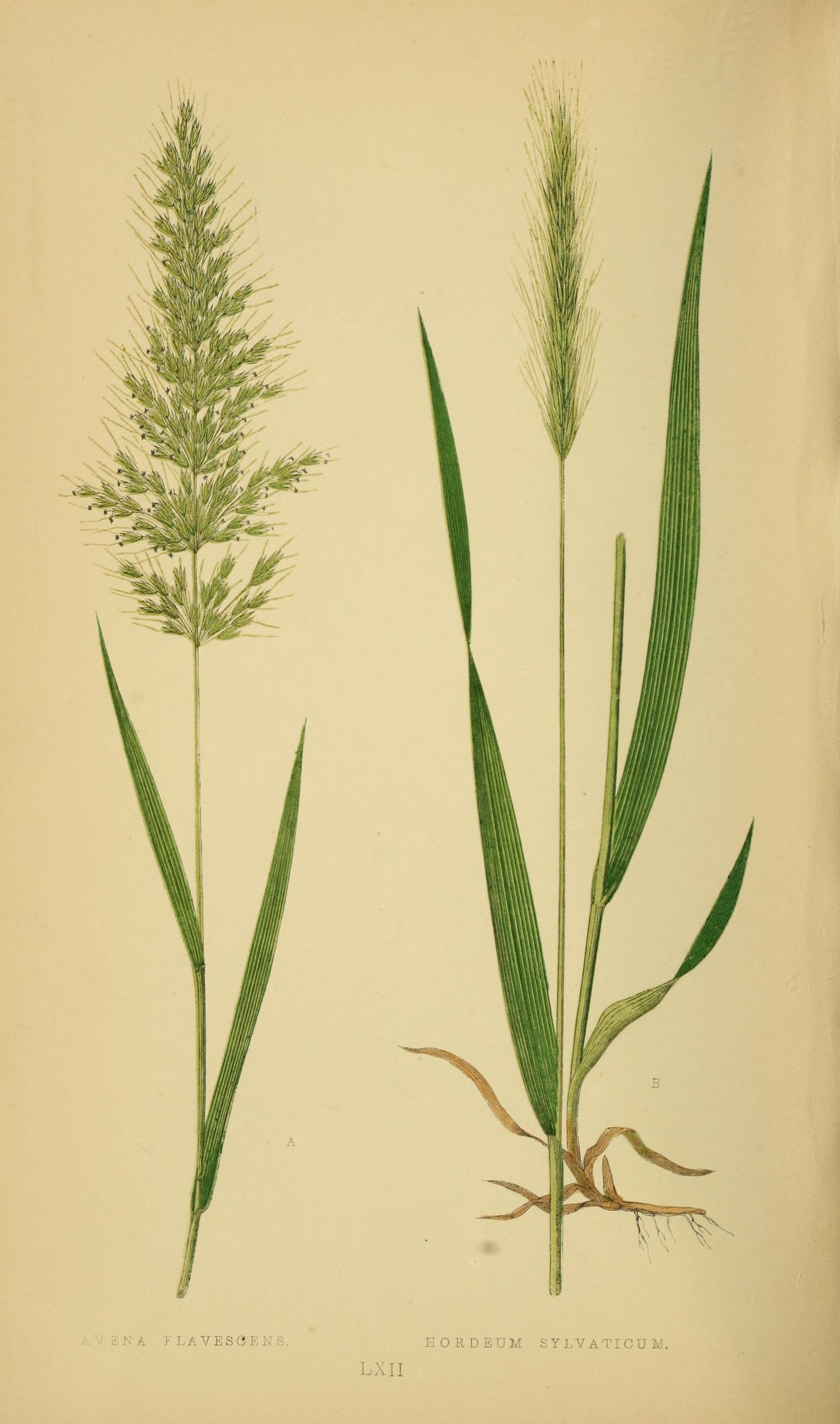 JSIA FLAVESORNS LXII OllDEUM SYJ.VATICUM.